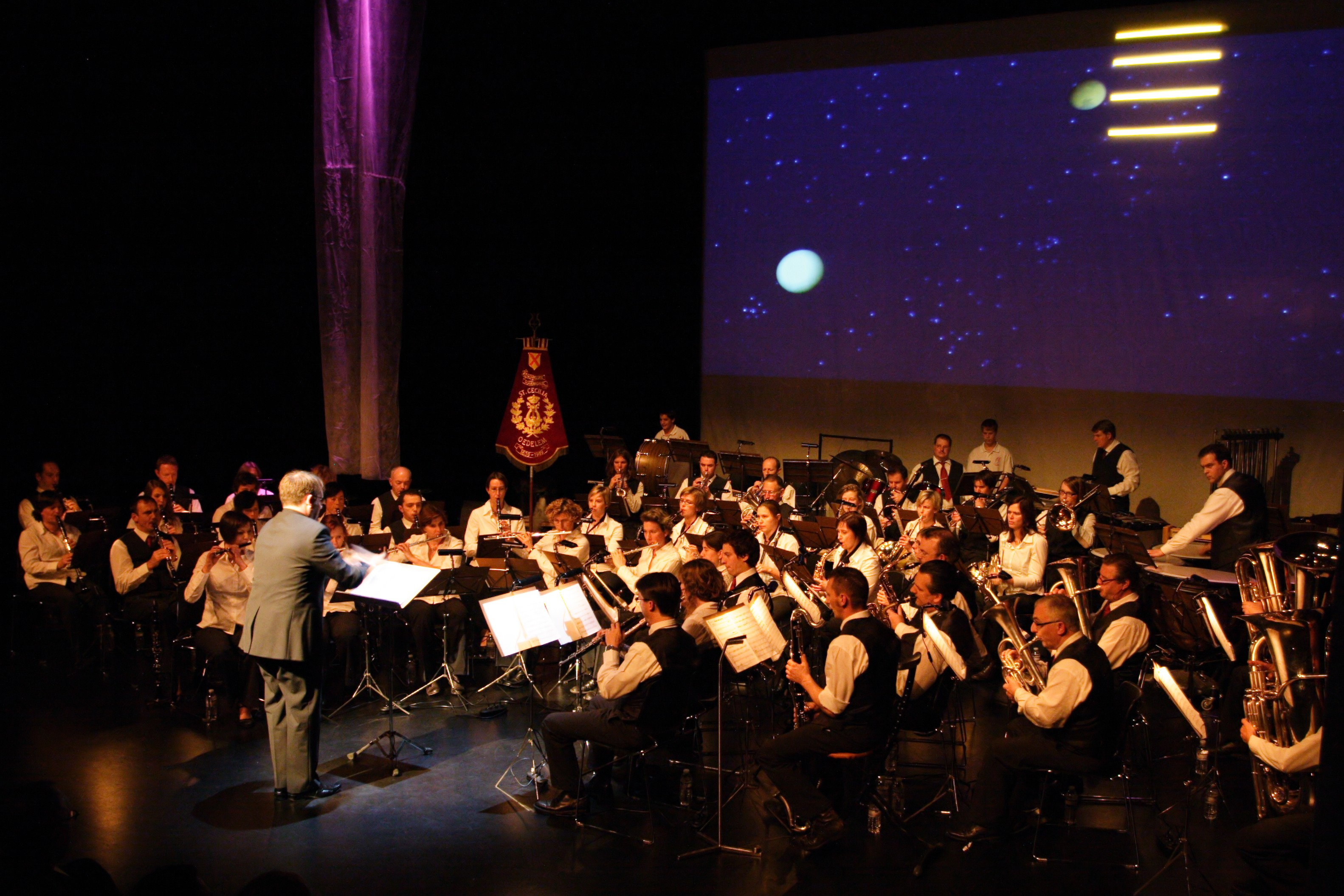 De Oedelemse harmonie onder leiding van Geert Baeckelandt